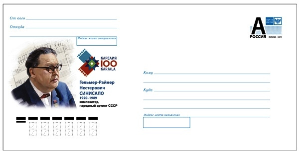 Почтовый маркированный конверт с изображением композитора Гельмера Синисало к его 100-летнему юбилею, который отмечается в 2020 году. На конверте расположен логотип празднования 100-летия Республики Карелия (2020 г.).